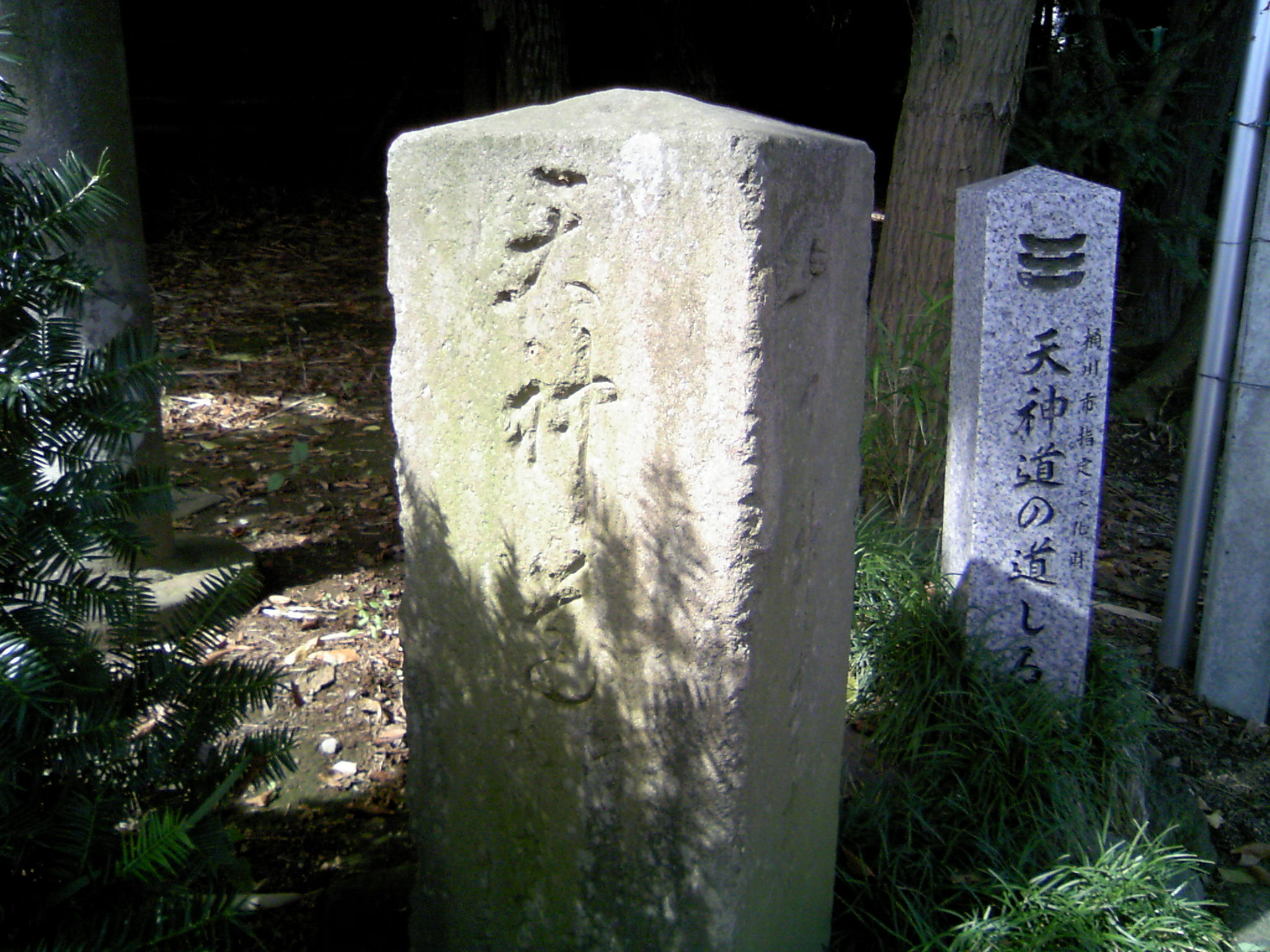 天神道の道しるべ。中山道桶川宿から加納天満宮までの道を案内している。